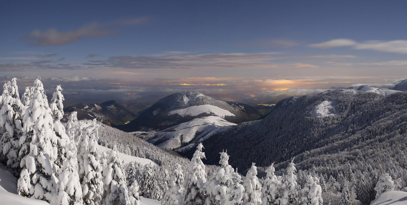 Vallée de Baretous vue du pic d'Issarbe (photographie nocturne)